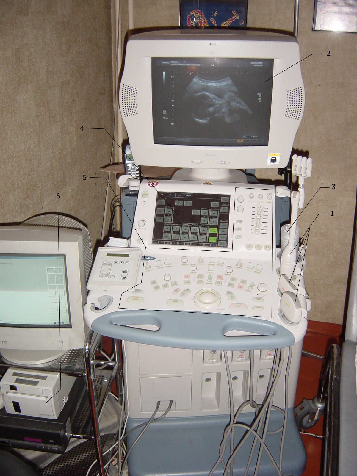 Echographe de marque Toshiba modèle Aplio. Photo prise par Raziel juin 2006 à 00:56 (CEST) 1. Les sondes 2. Système de visualisation 3. Gel pour échographie 4. Console de commande 5. Console d'acquisition 6. Imprimante